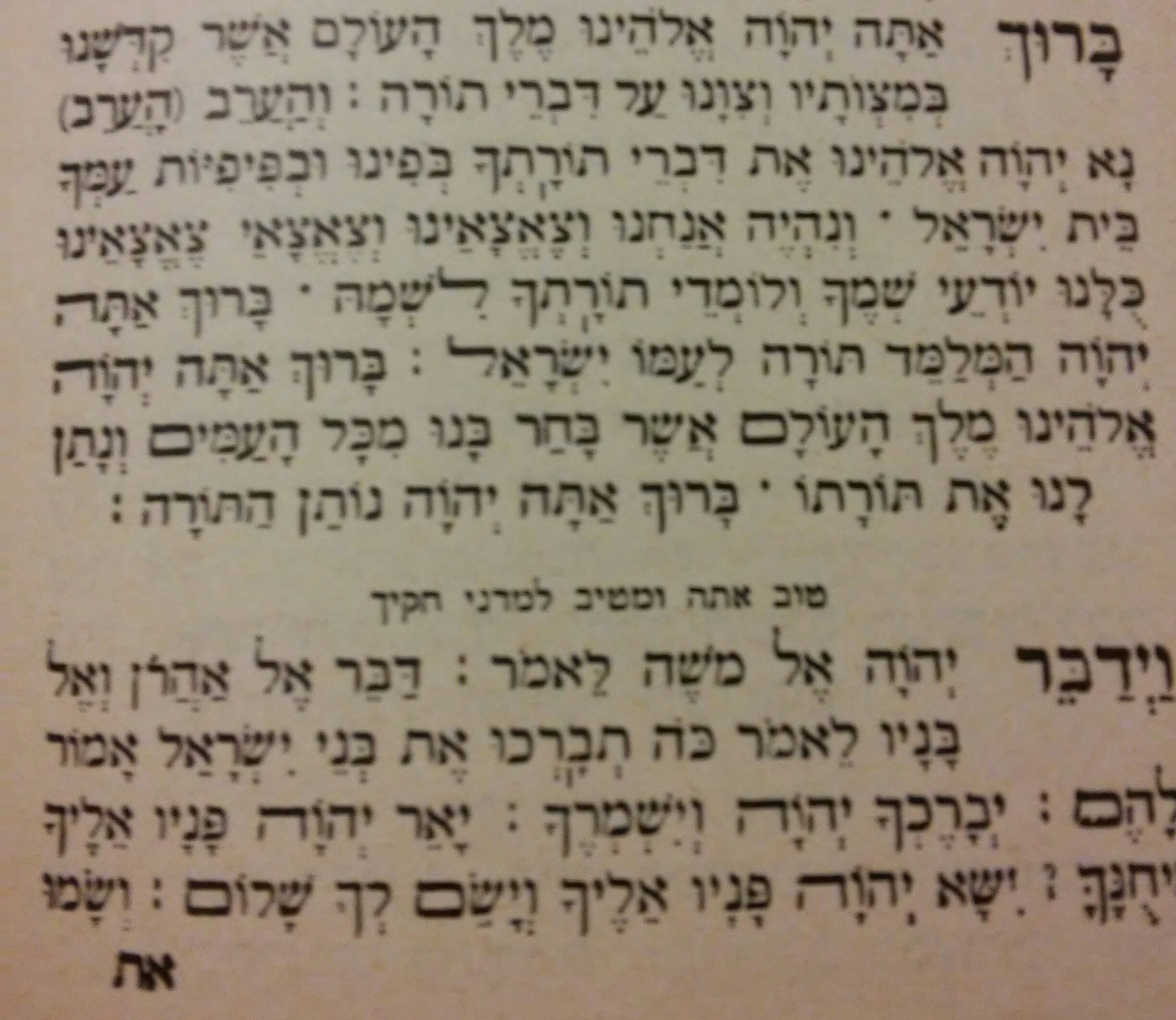 סדור בית מנוחה, הוצאת שילה, ירושלים